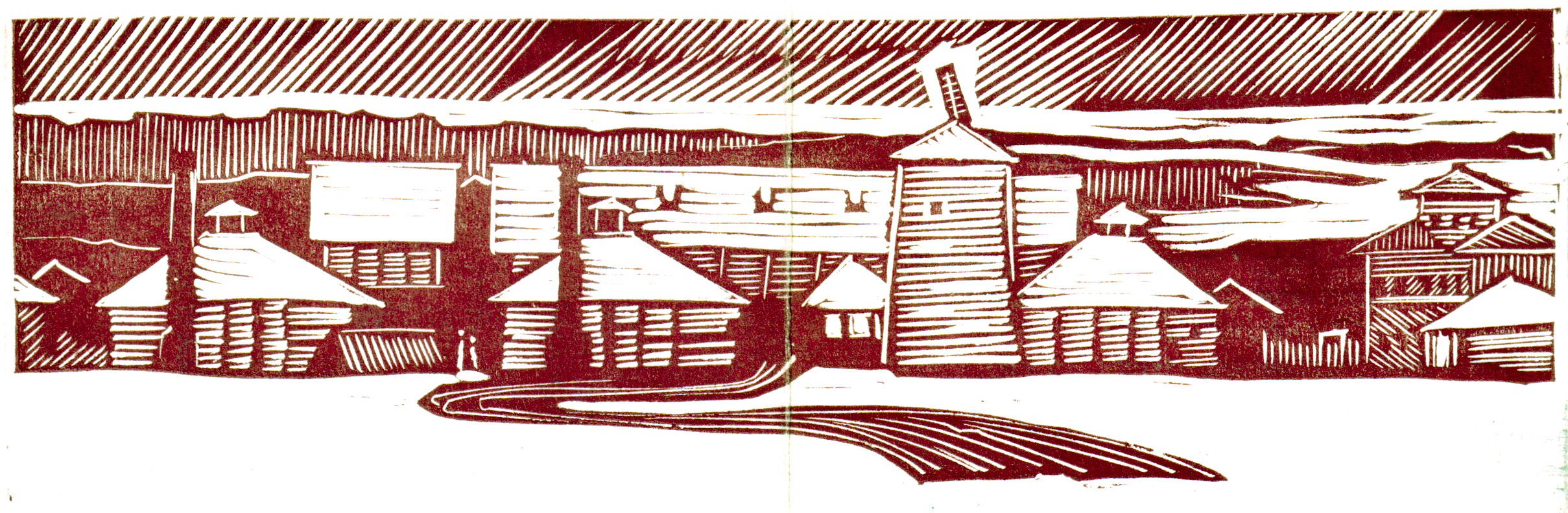 «Сользавод», гравюра, 1986 г. (Соликамск)